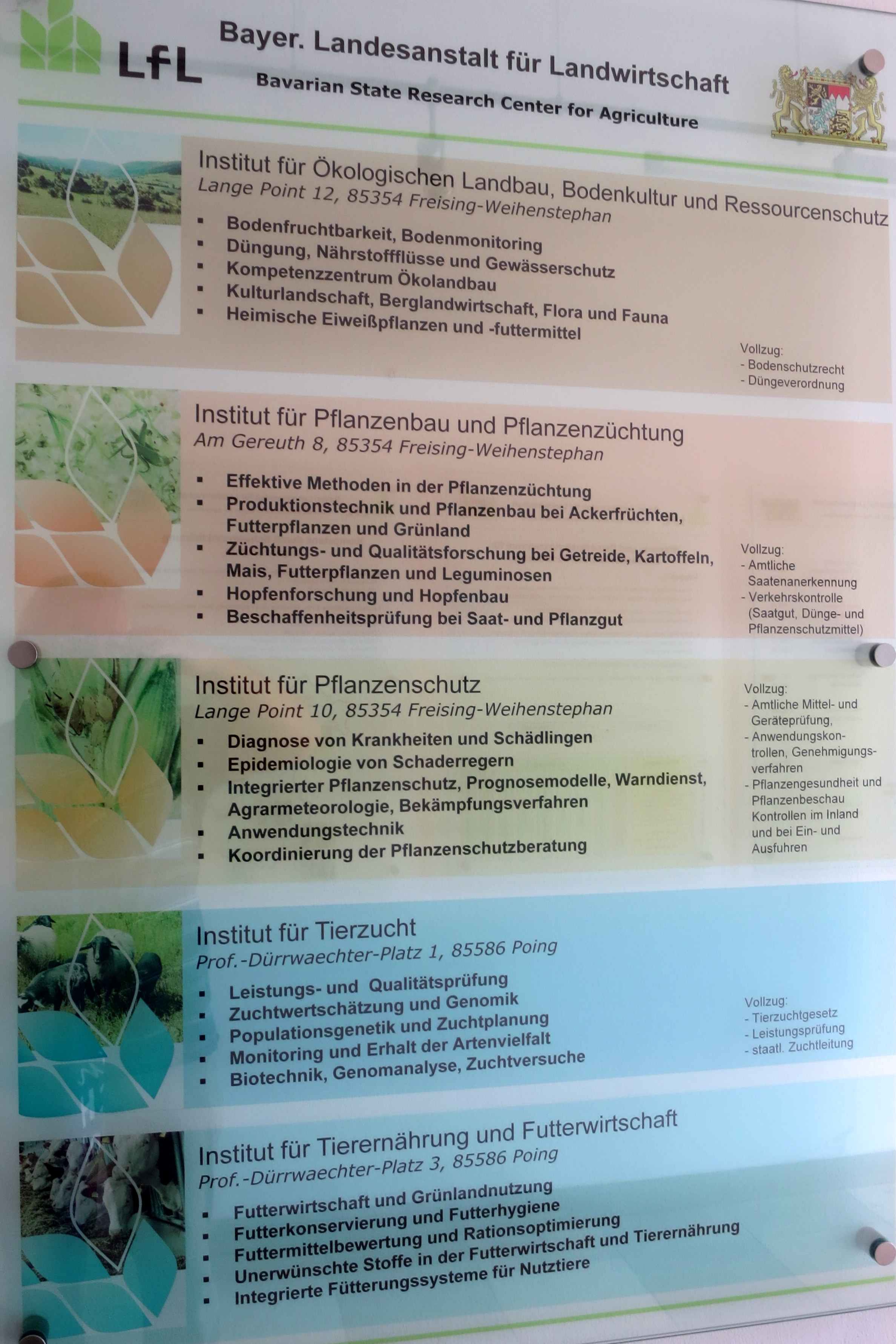 Infotafel im Verwaltungsgebäude 01